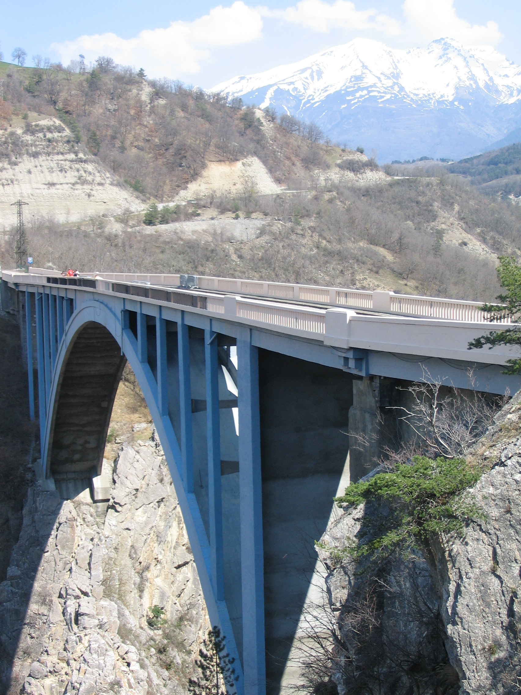 Pont de Ponsonnas (Isère), D526 La Mure/Mens -- l'ouvrage, qui franchit la vallée du Drac à une hauteur de 103 m, est un haut lieu de la pratique du saut à l'élastique.